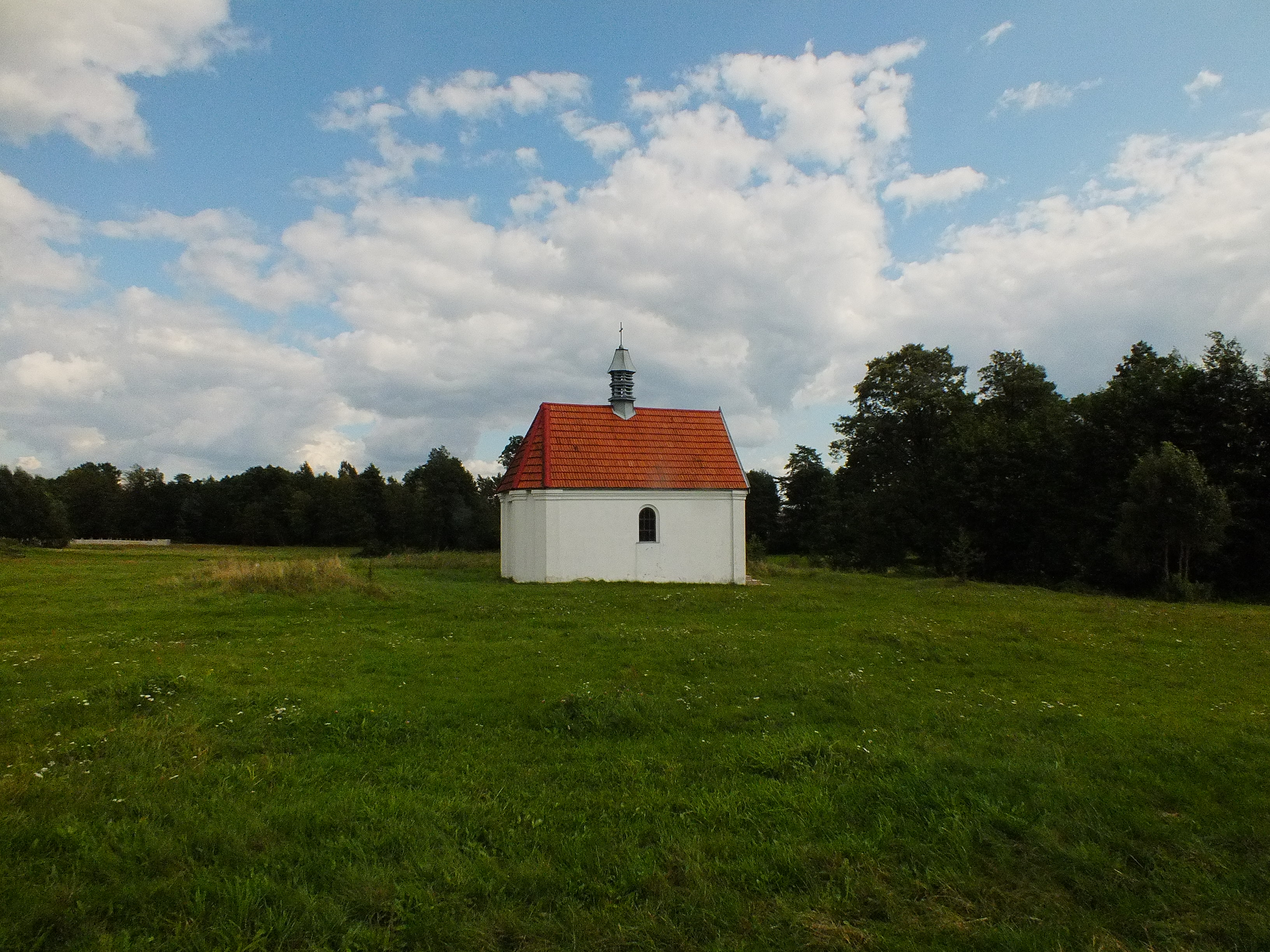 Wola Jachowa, kaplica pw. św. Joachima, 1 poł. XIX w.